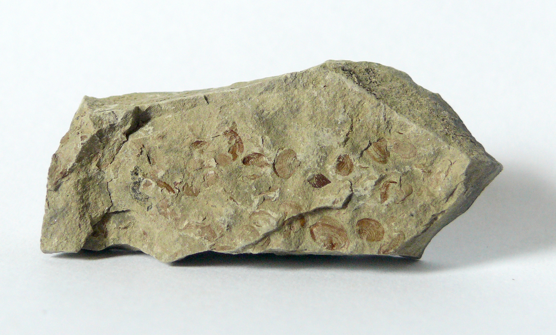 Palaeestheria minuta (Syn. Estheria minuta) aus der Erfurt-Formation, "Estherienschichten" Hohenlohe, Deutschland